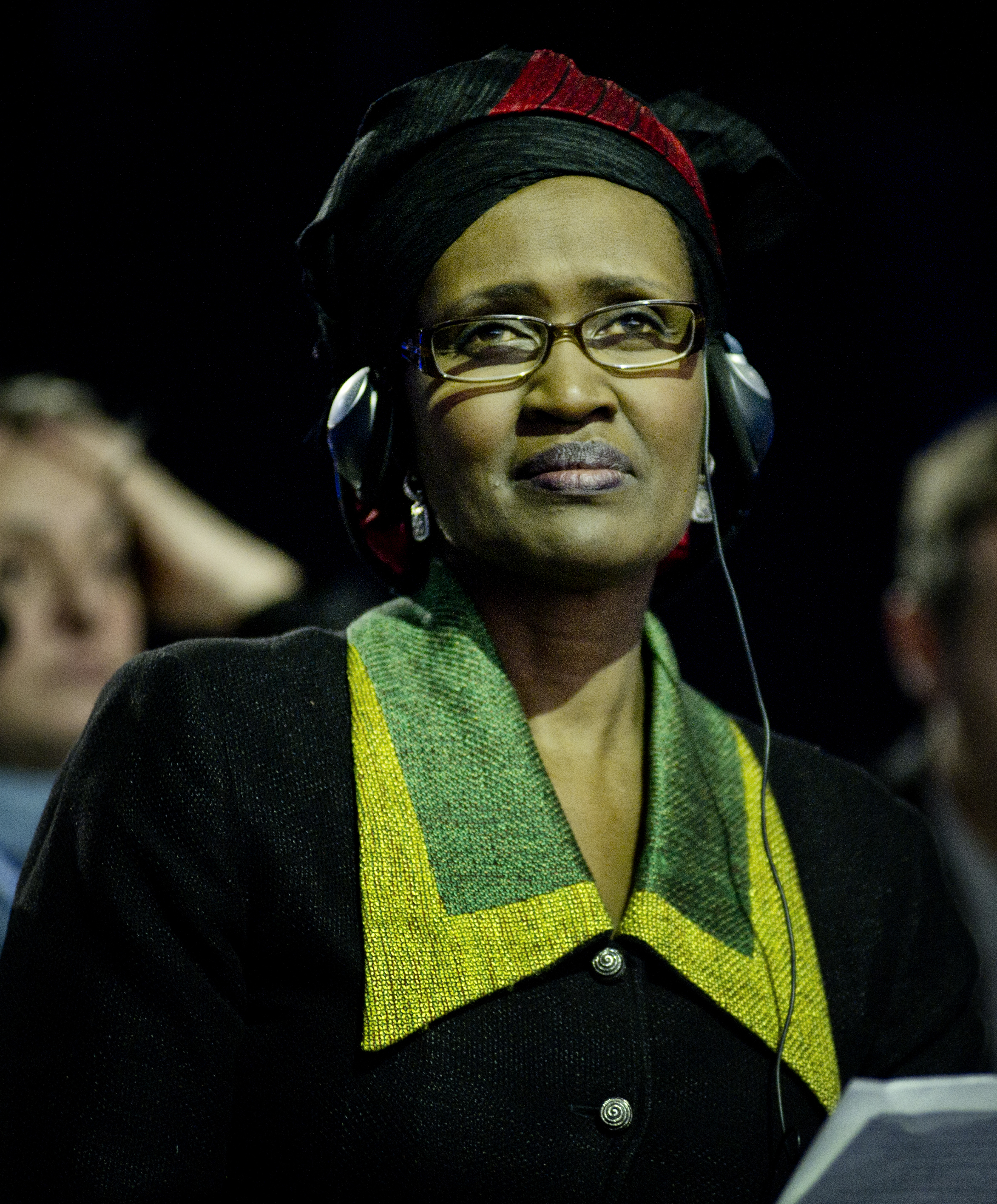 Winnie Byanyima, directrice exécutive d'Oxfam international